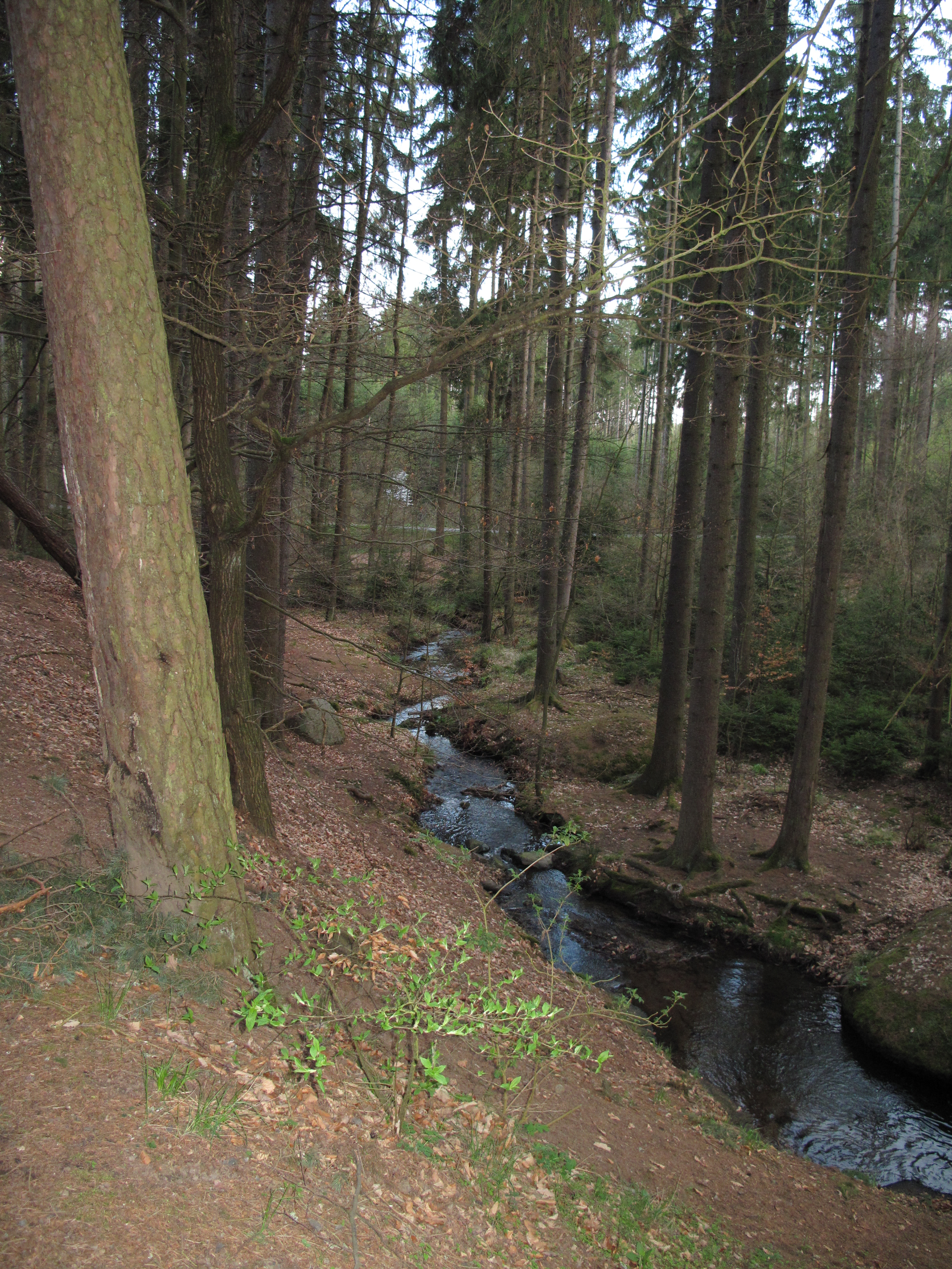 Zvánovický potok. Okres Praha-východ, Česká republika.